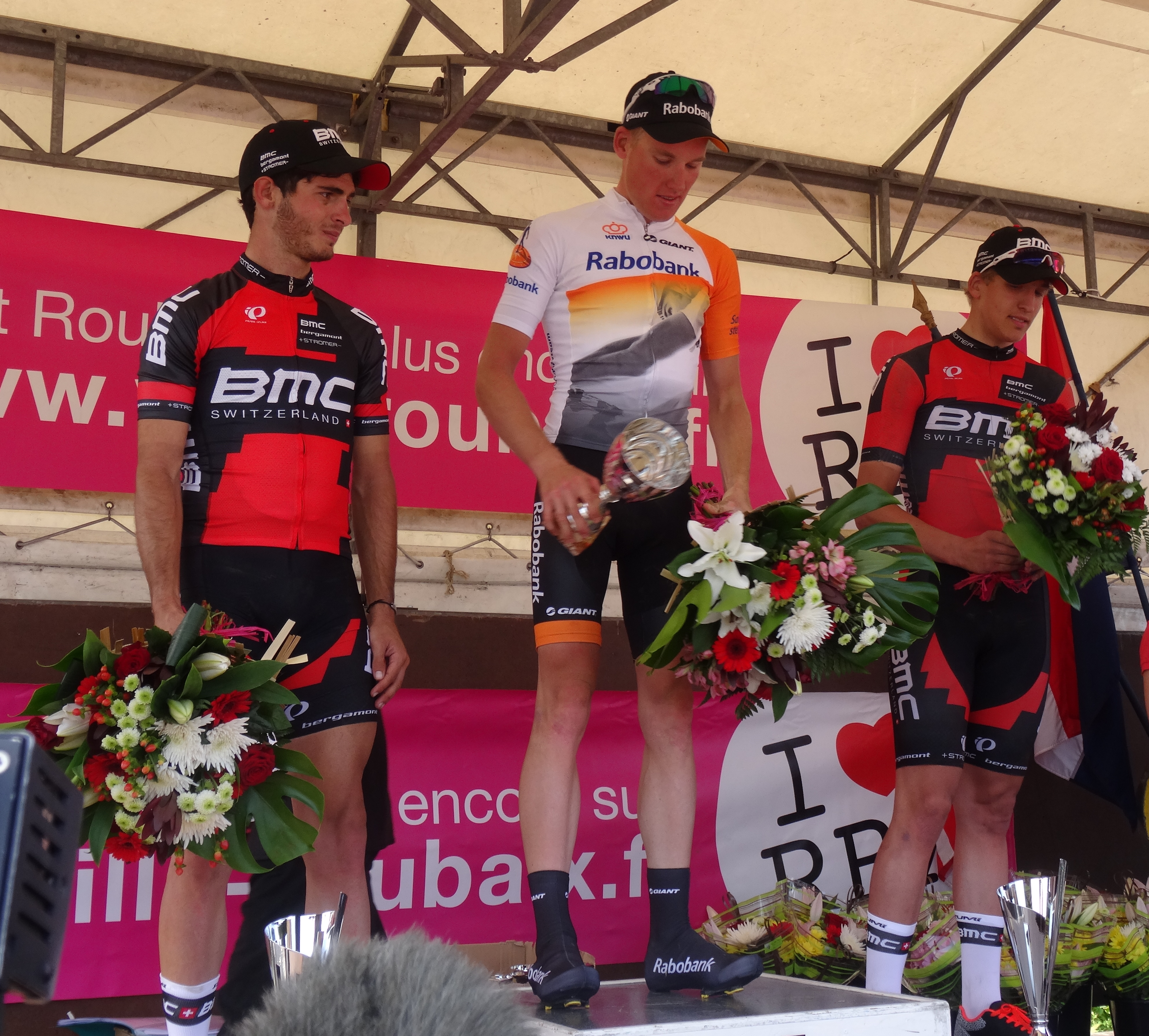 Reportage réalisé le dimanche 1er juin à l'occasion de l'arrivée du Paris-Roubaix espoirs 2014 au vélodrome André-Pétrieux à Roubaix, Nord, Nord-Pas-de-Calais, France.